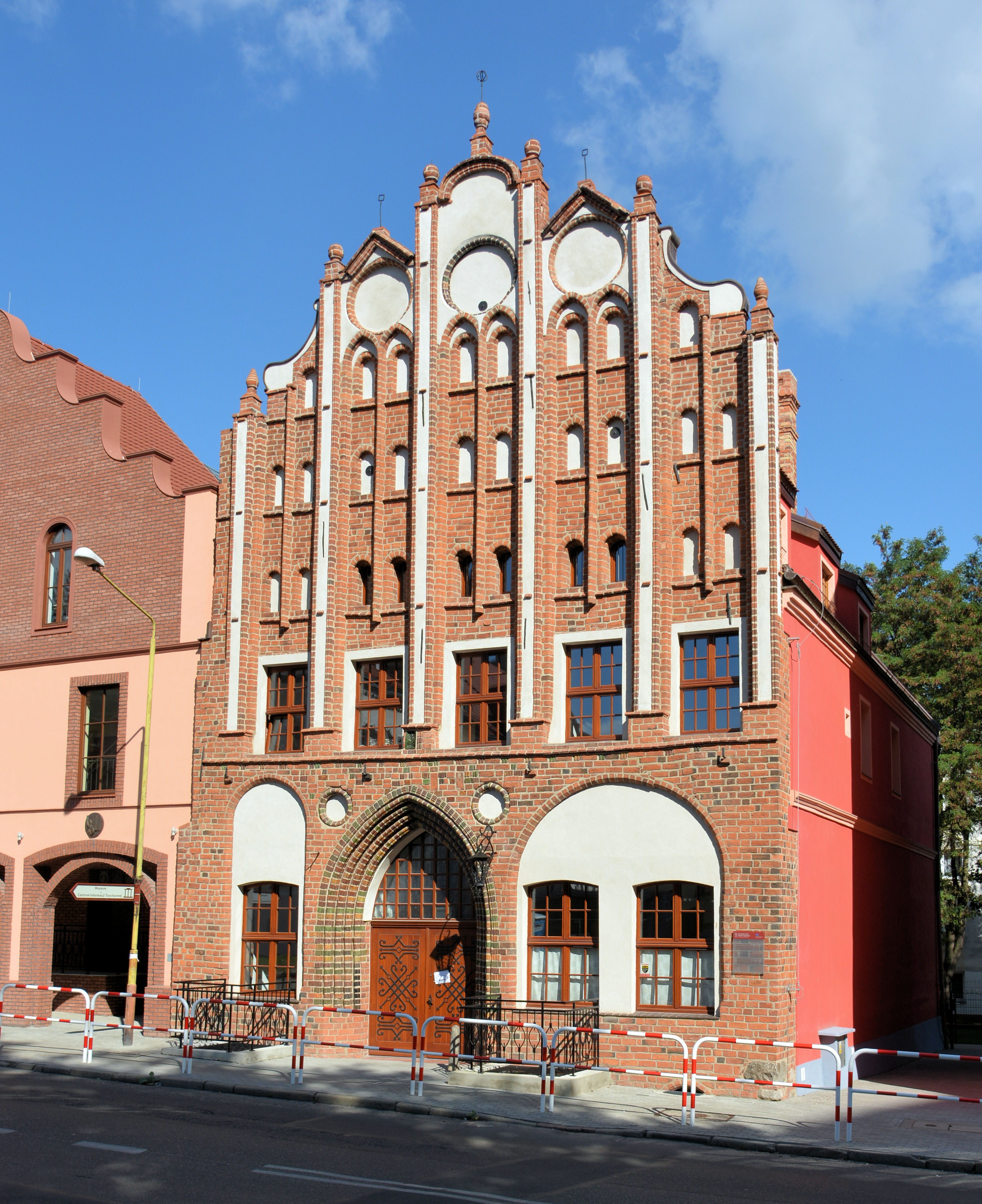 Stargard Szczeciński, dom (kamienica), XV-XVI, po 1945